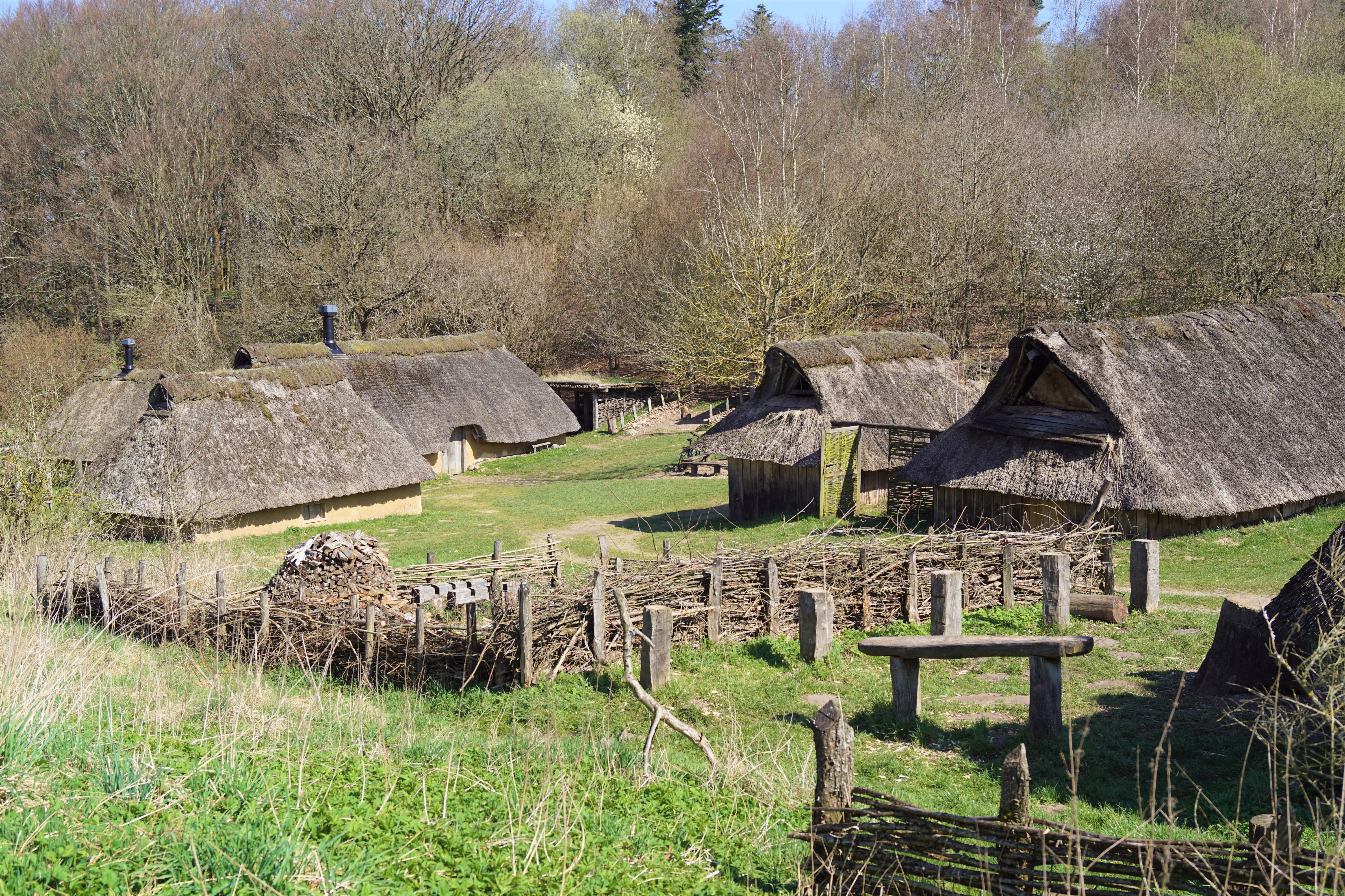 Hoddegaarden og Overbygård på Jernaldercenteret ved Vingsted Historiske Værksted